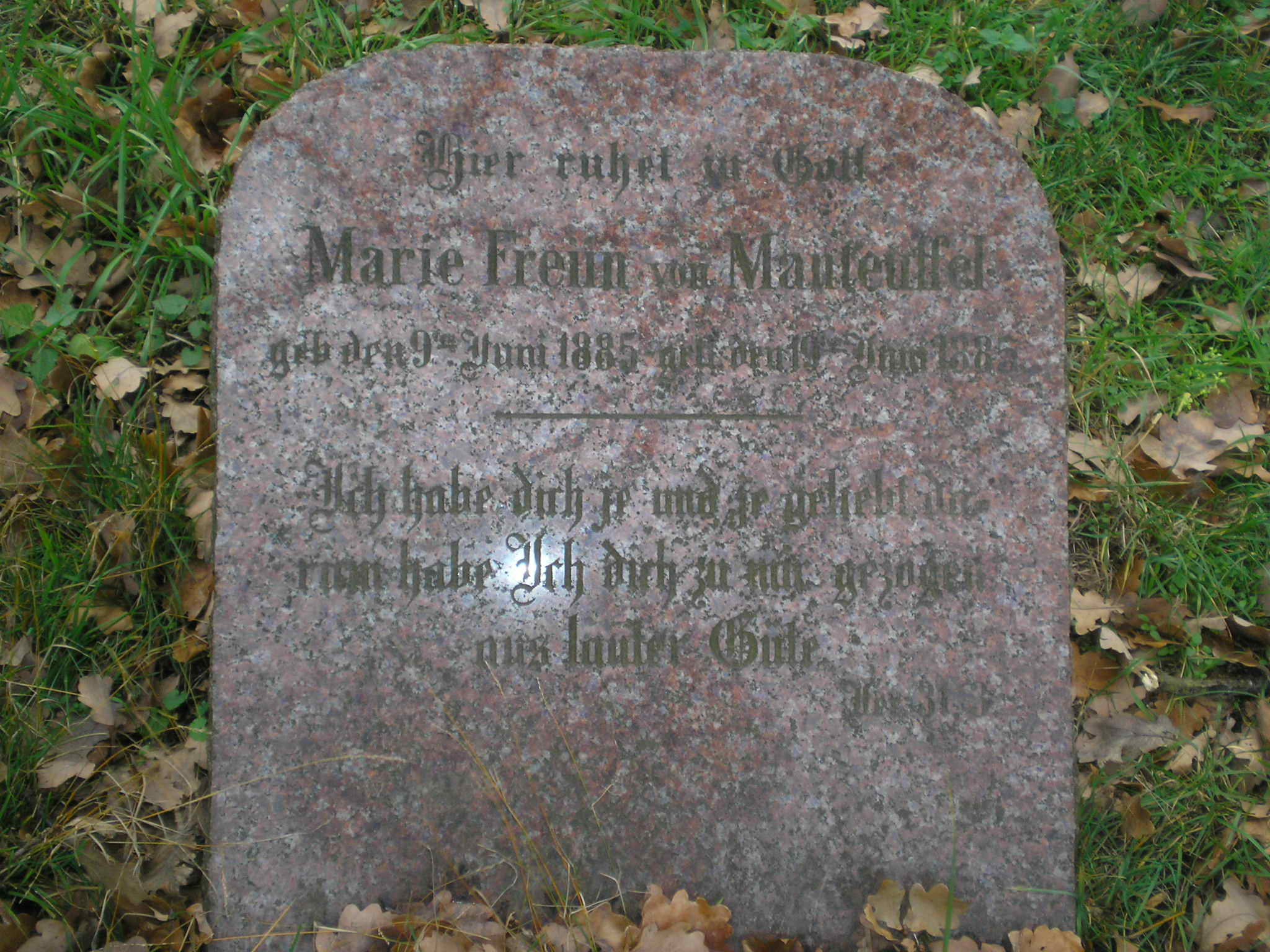 Grobowce rodziny Manteuffel w Toporowie